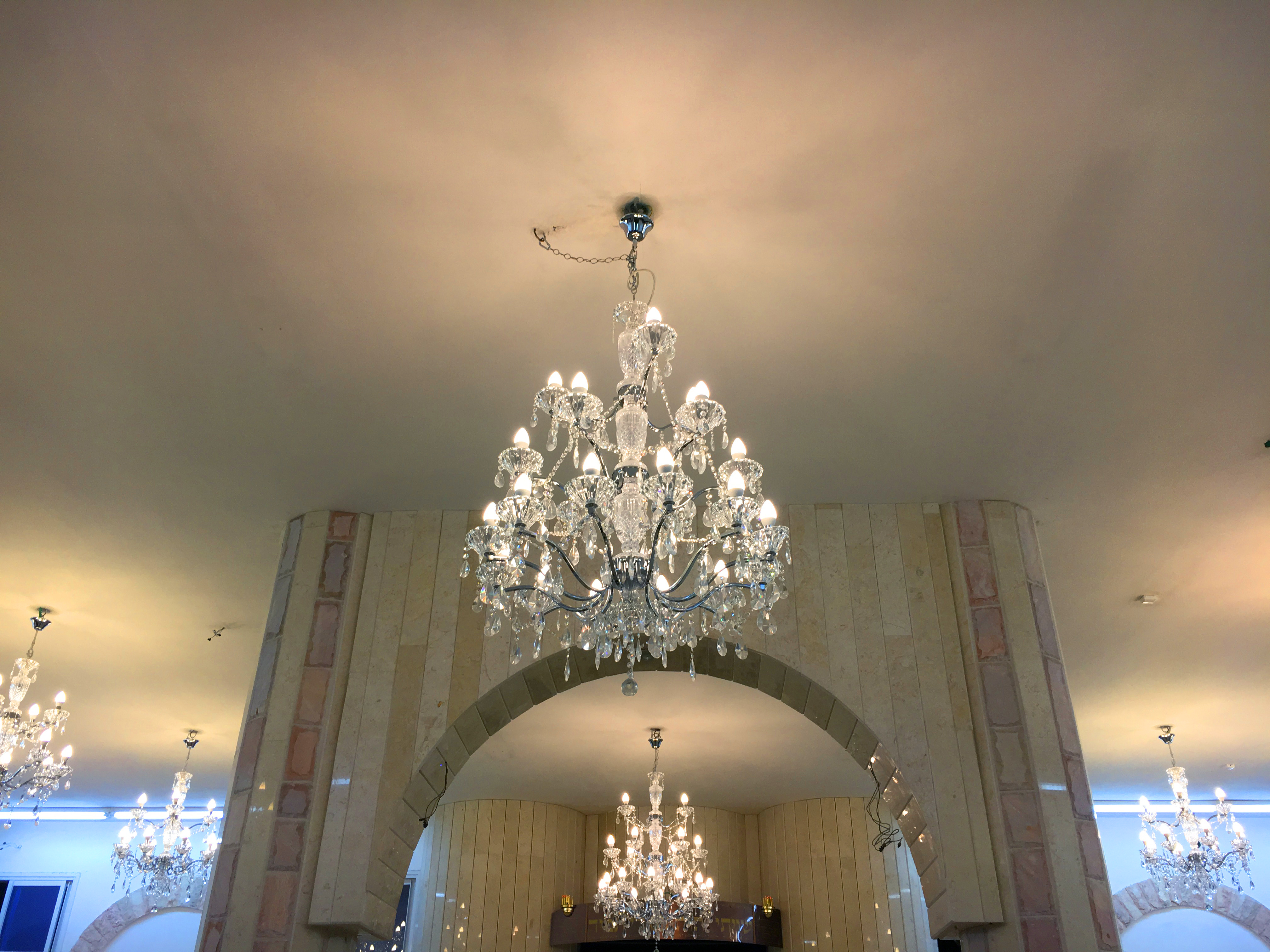 פנים בית הכנסת מאור חכמי המערב, בקרבת התיבה וההיכל.